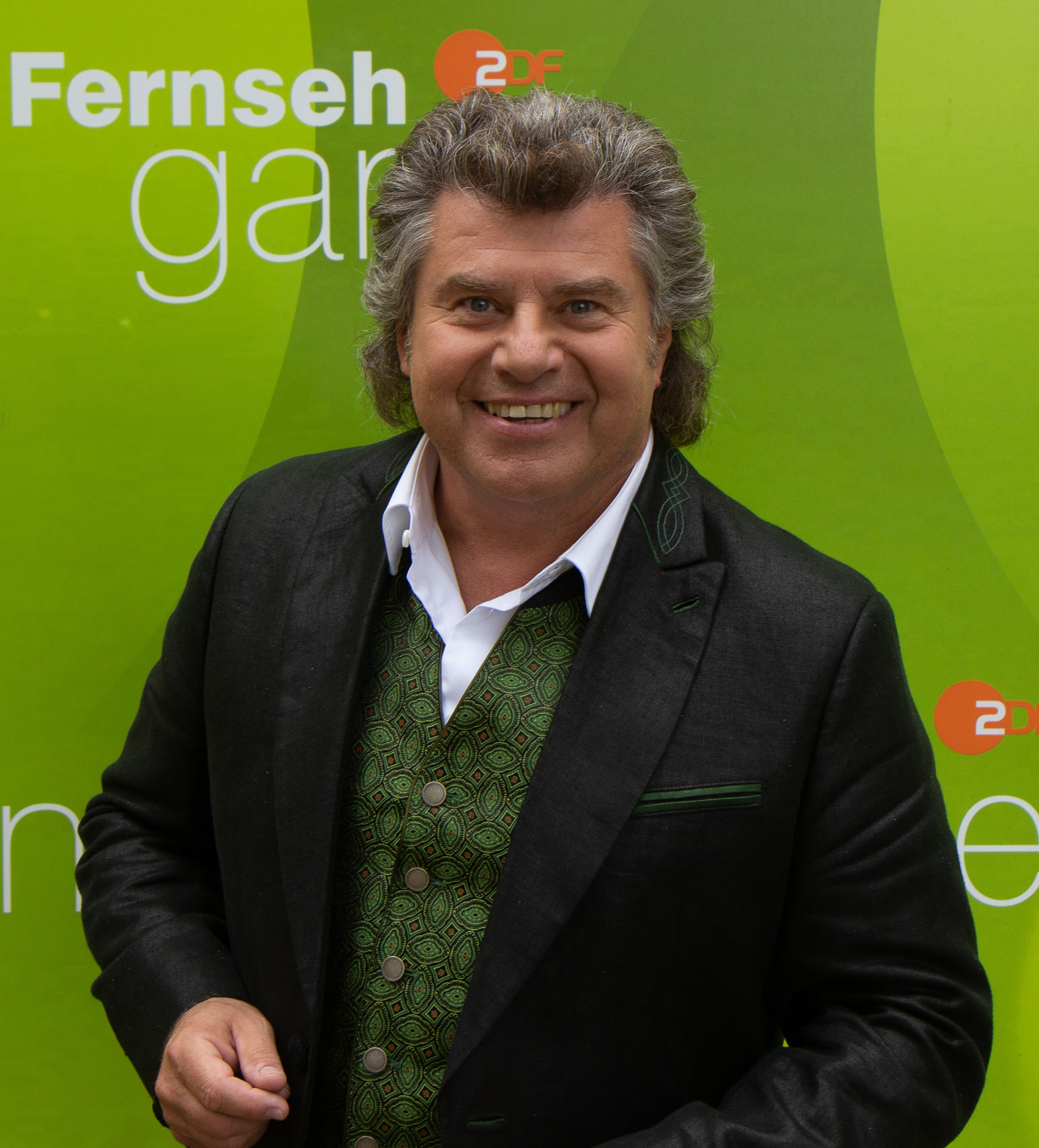 Andy Borg als Gast im ZDF-Fernsehgarten am 23. September 2018 in Mainz.